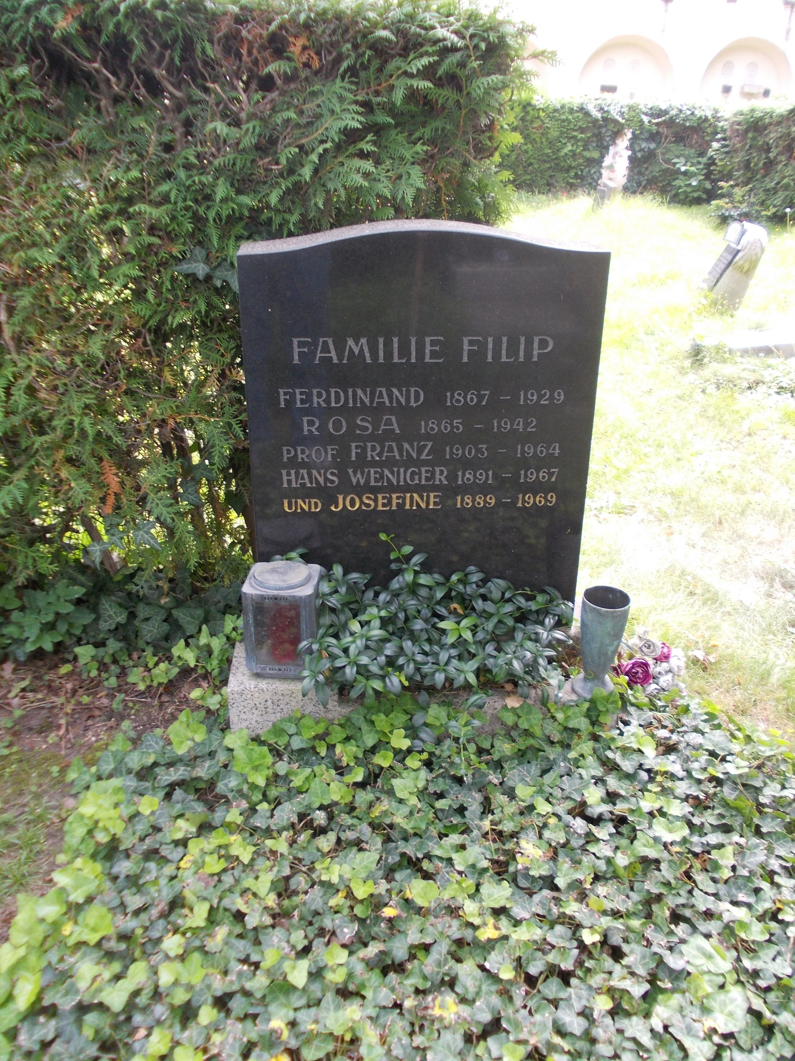 Frank Philipp-Feuerhalle Simmering (3-2-7-12)